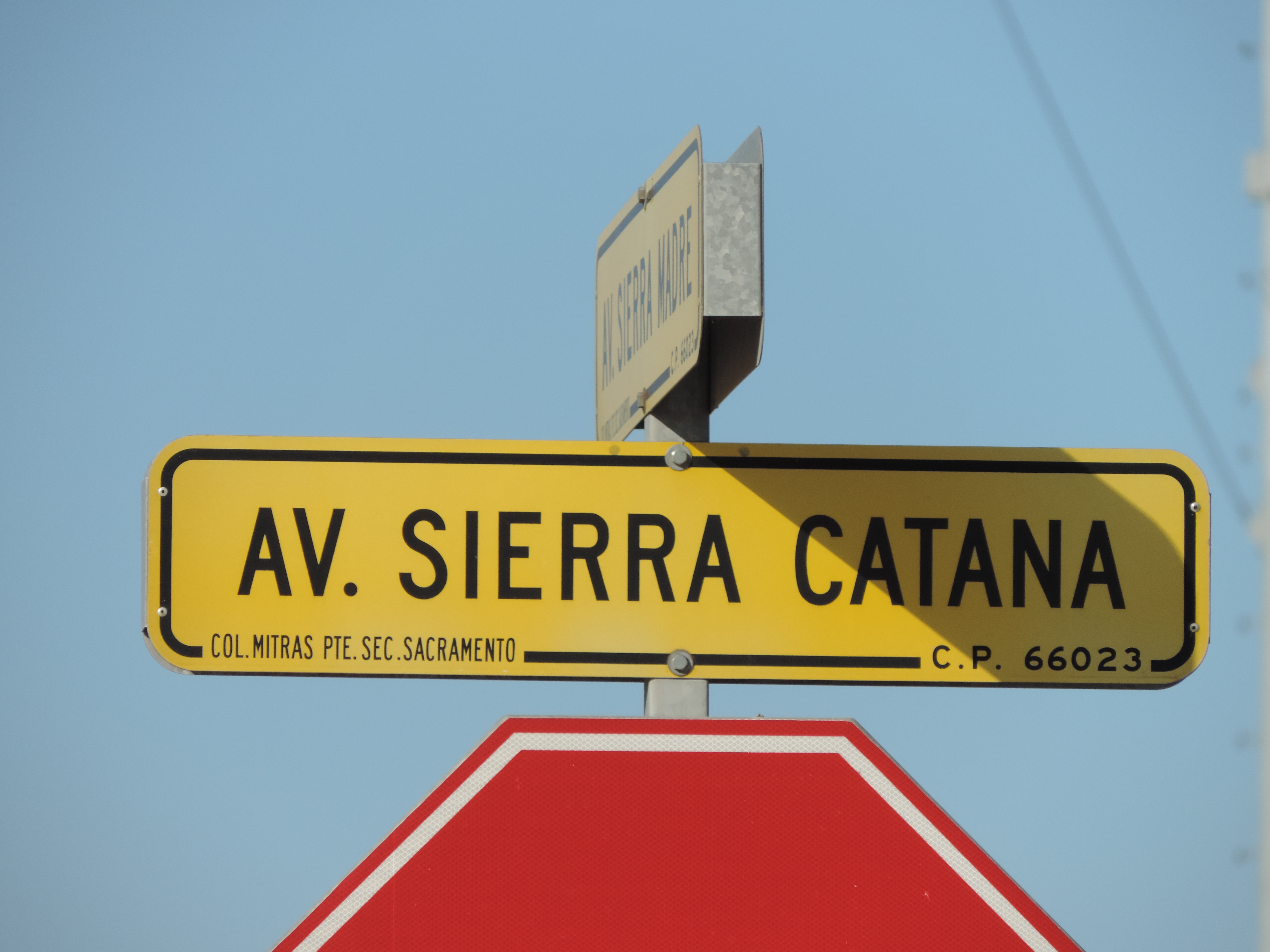 Letrero de la Avenida Sierra Catana